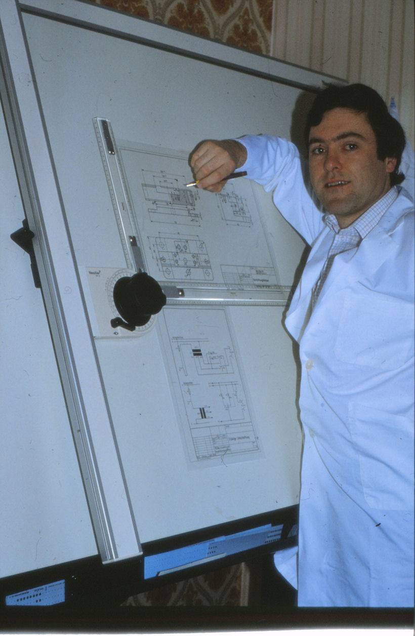 Technischer Zeichner Bis in die 70er Jahre hinein war das Handwerkszeug des technischen Zeichners das Zeichenbrett (früher Reißbrett), Lineale, Zeichenschablonen, Minenstift und Tusche-Zeichenstift in verschiedenen Strichstärken. Die Ausbildungszeit beträgt 3,5 Jahre. Heute hat der Computer das Zeichenbrett verdrängt.